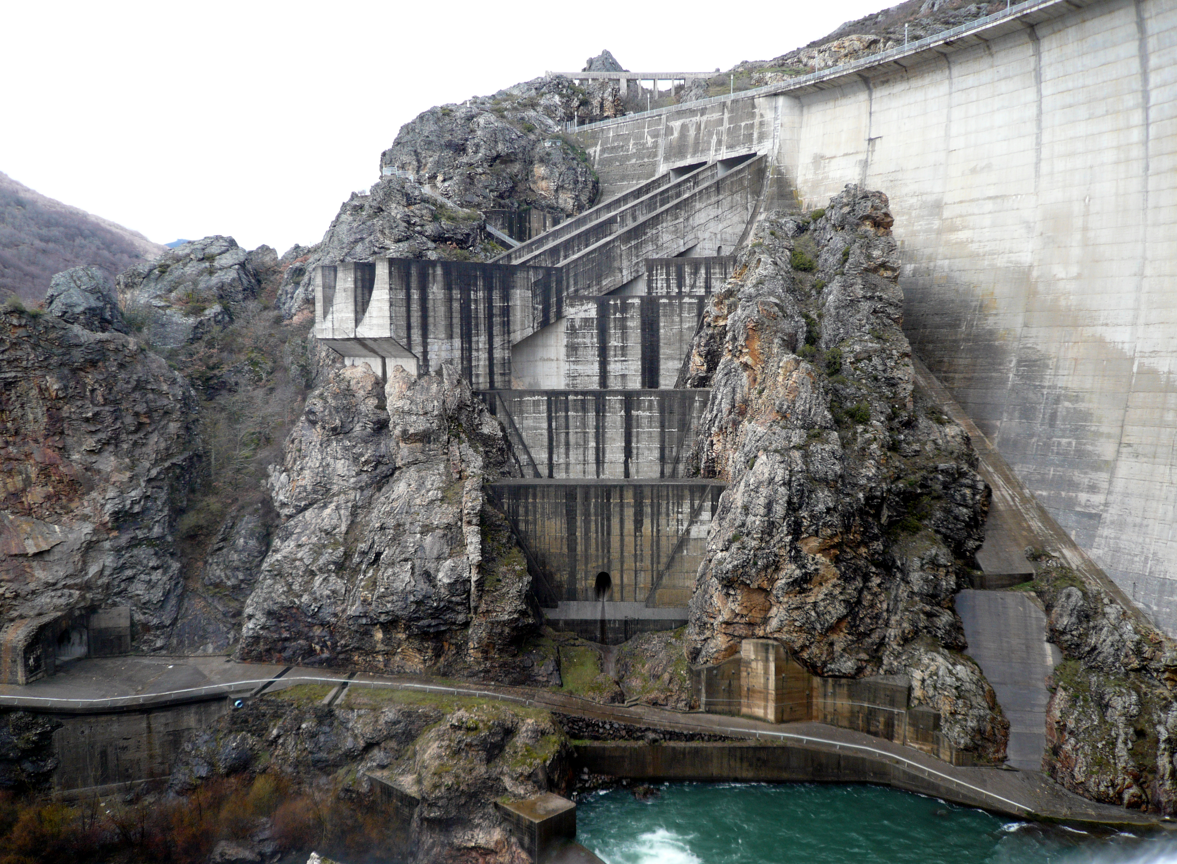 Presa del embalse de Riaño, provincia de León, Castilla y León, España.